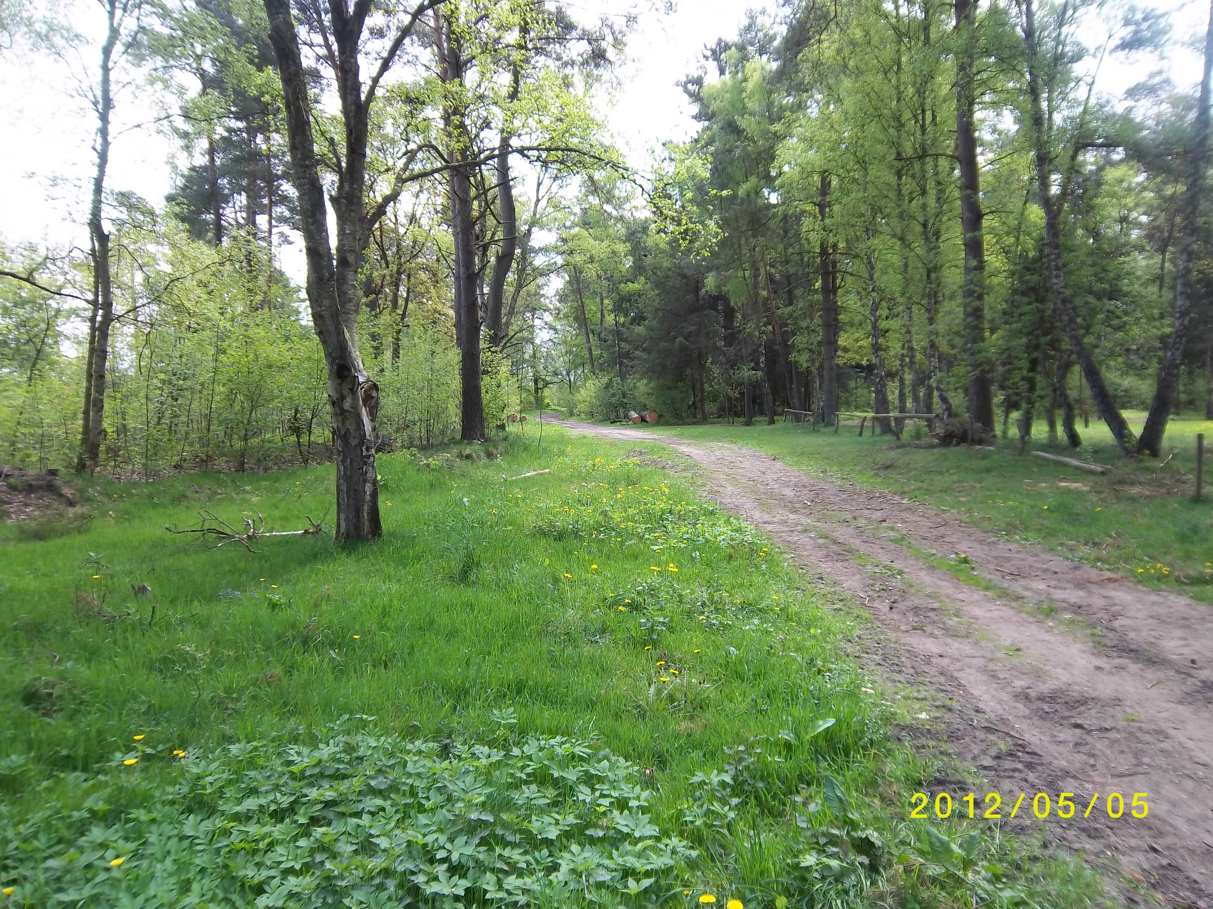 Ehemaliger Bahnhof Alter Schafstall.